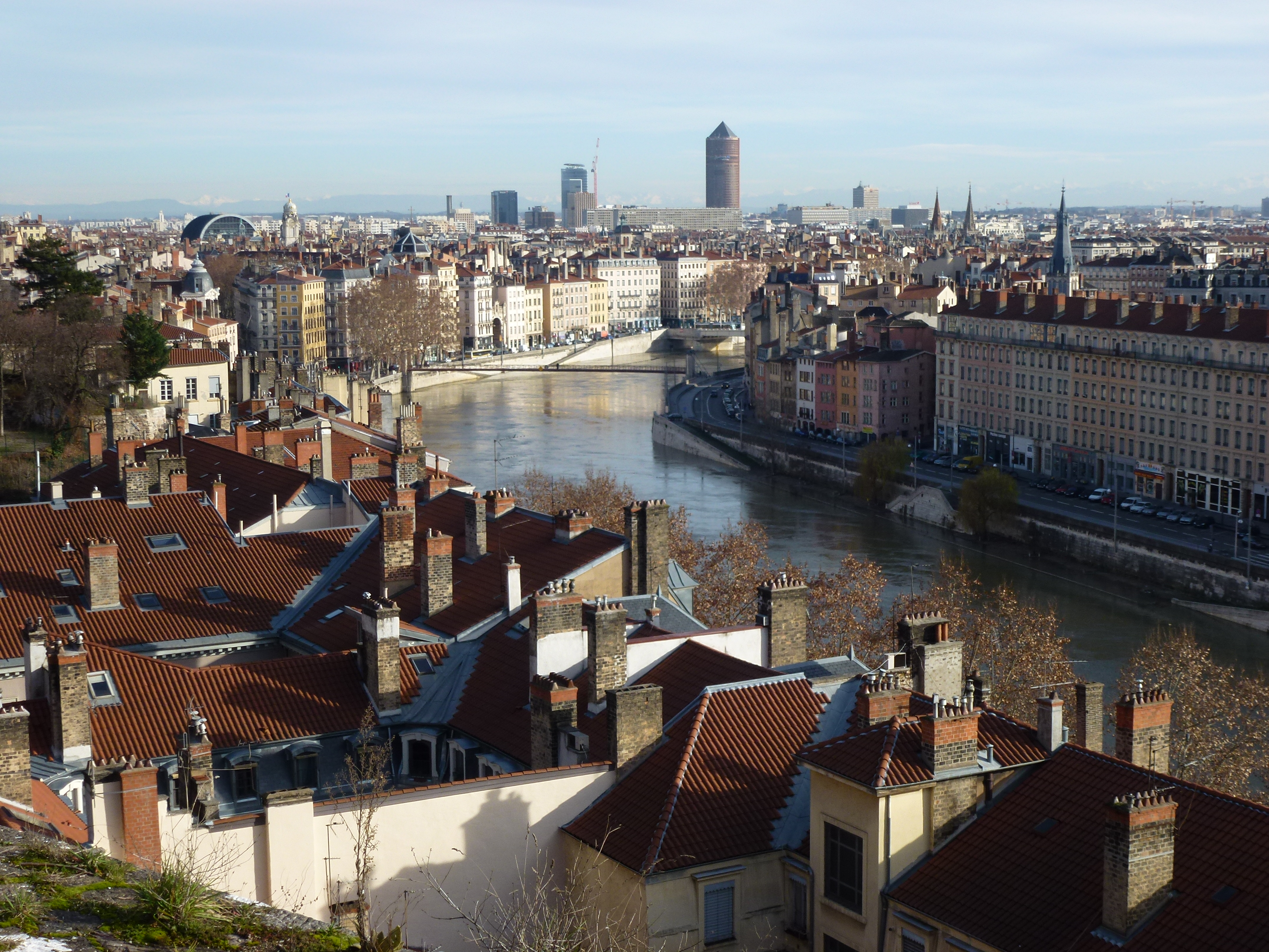 Le jardin des Chartreux à Lyon (1er) - Vue sur la ville et la Saône